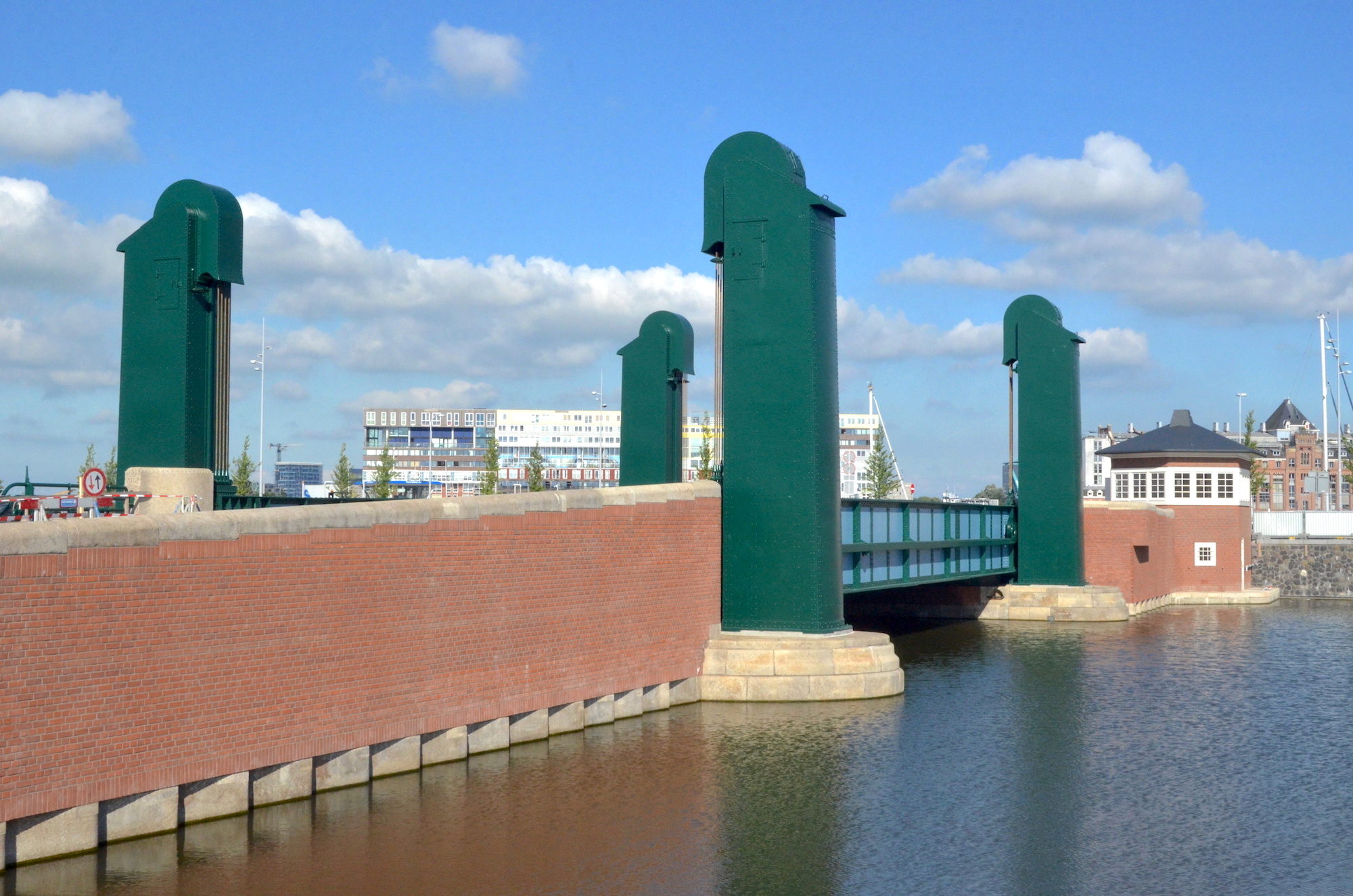 De Gevlebrug (brug 2430) in de Houthavens (Amsterdam)